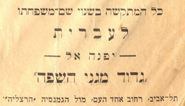 מודעה בנוגע לעברות שמות משפחה בתקופת תחיית העברית בארץ ישראל במאה העשרים. "כל המתקשה בשינוי שם משפחתו לעברית - יפנה אל - "גדוד מגני השפה" תל אביב, רחוב אחד העם, מול הגמנסיה "הרצליה"." מקור סריקה: עמוד הפייסבוק הרשמי של הספרייה הלאומית ( (הורדה)